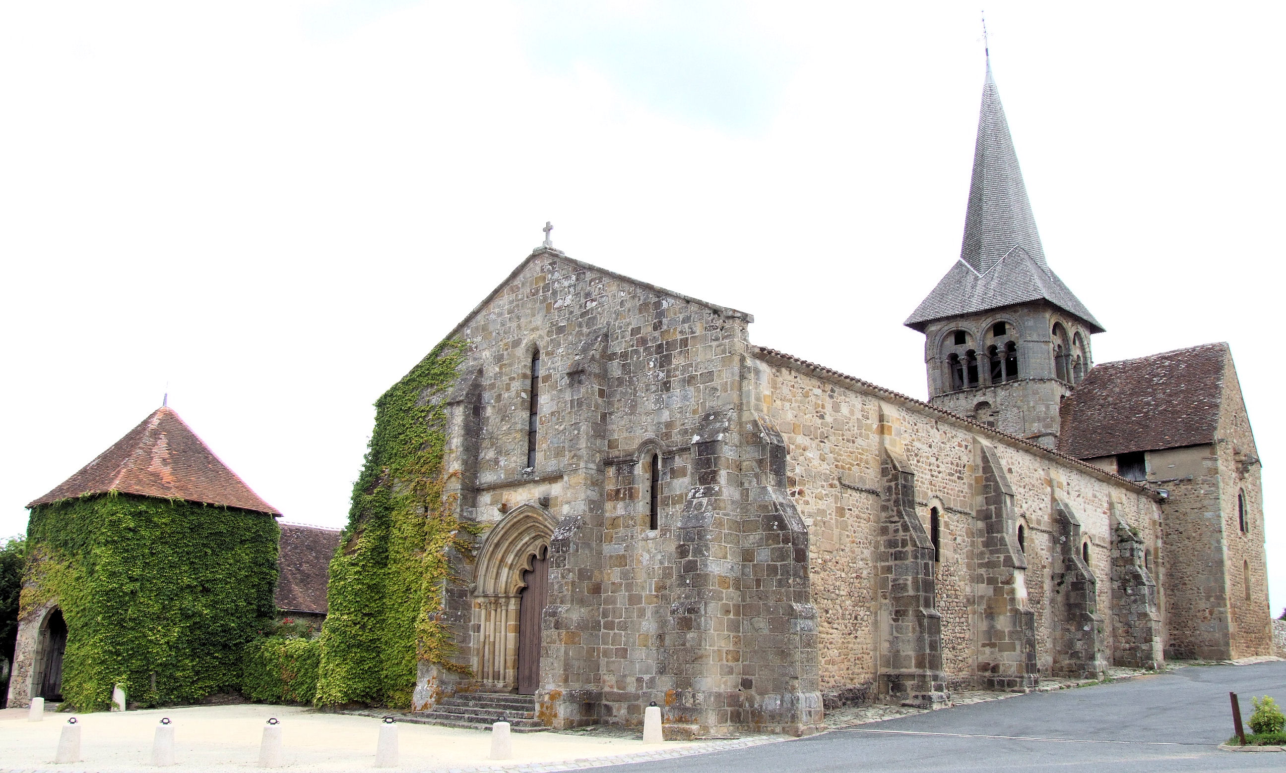 Colombier - Eglise Saint-Patrocle